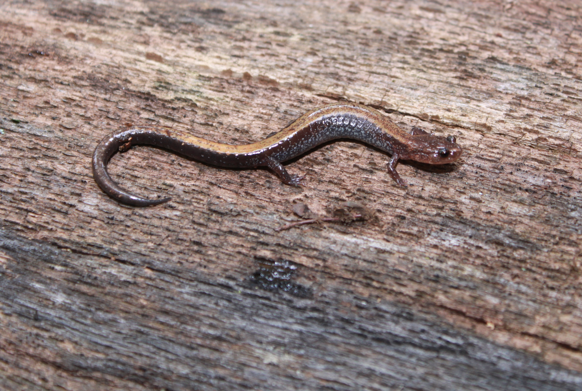 Redback salamander